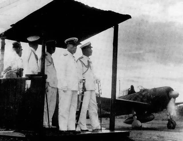 い号作戦時、ラバウル東飛行場で出撃機を見送る、山本五十六長官と宇垣纏参謀長。